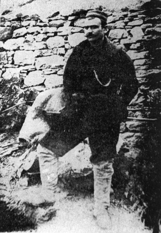 Антониос Влахакис (капитан Лицас).